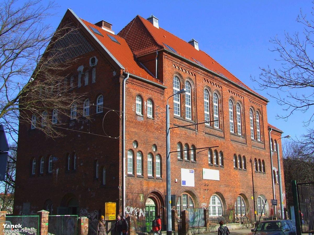 Dawna łaźnia miejska a obecnie filia Centrum Sztuki Współczesnej "Łaźnia" przy Jaskółczej na Dolnym Mieście. Widok od ul. ks. Góreckiego.